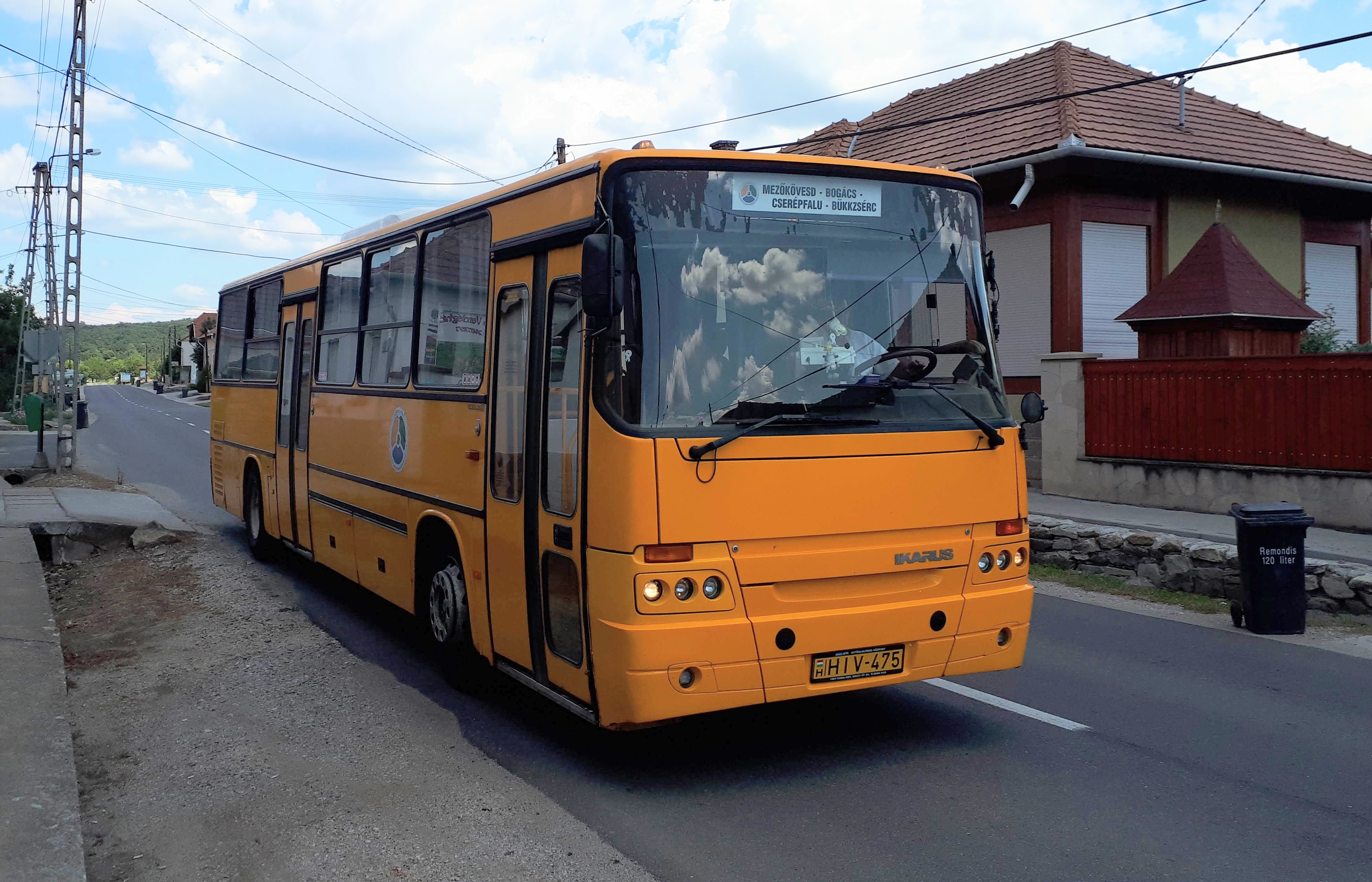 Az ÉMKK HIV-475 rendszámú Ikarus C56 típusú busza Bogácson, a 4023-as helyközi járaton.